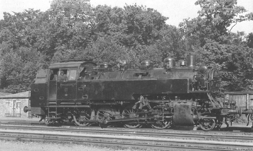 Lokomotive der Baureihe 86 als Nr. 41 der Bentheimer Eisenbahn auf einer historischen Aufnahme